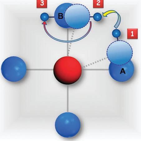 prootonülekanne